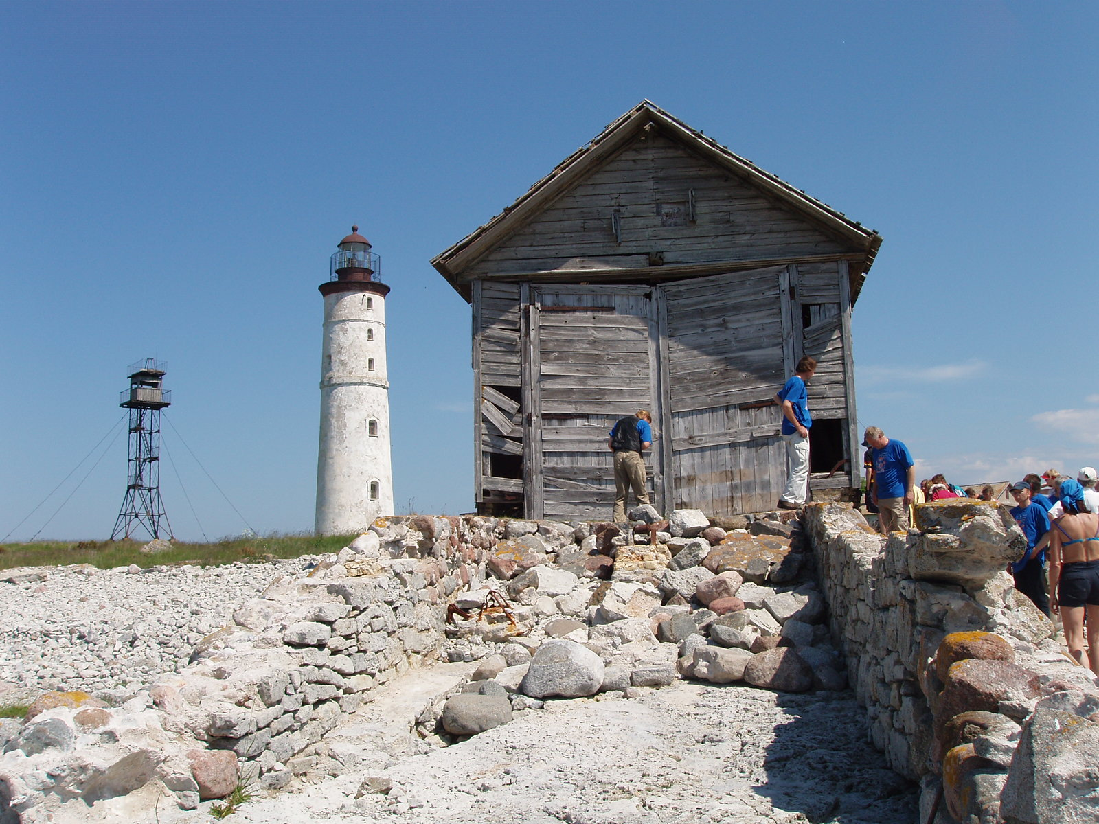 Vilsandi tuletorn ja päästejaama paadikuur 2005. aastal.